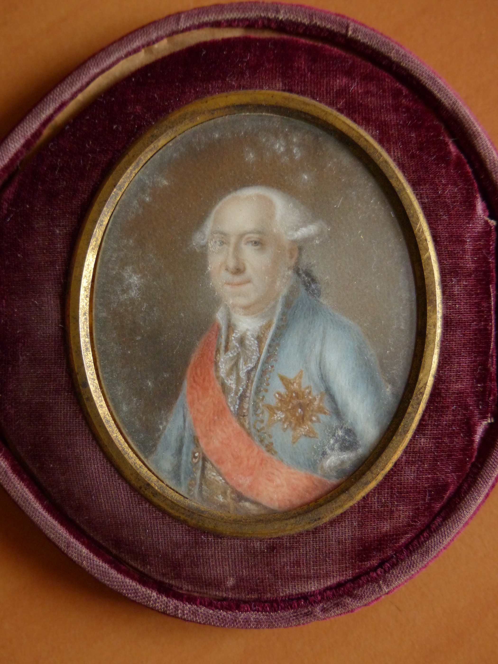 Portrait de Louis-Agathon de Flavigny de Renansart (1722-1793)